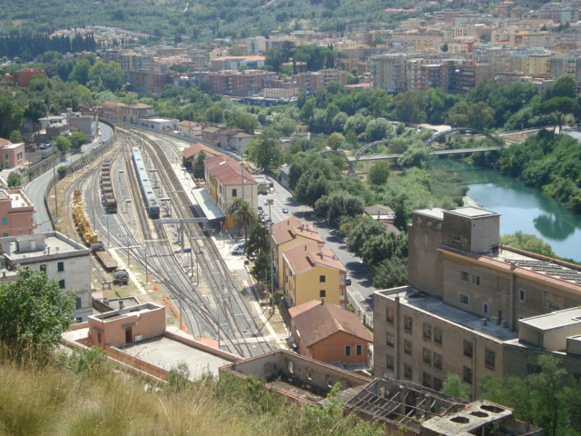 Vue plongeante depuis le Monte Catillo sur la gare de Tivoli avec l'Aniene sur la droite.